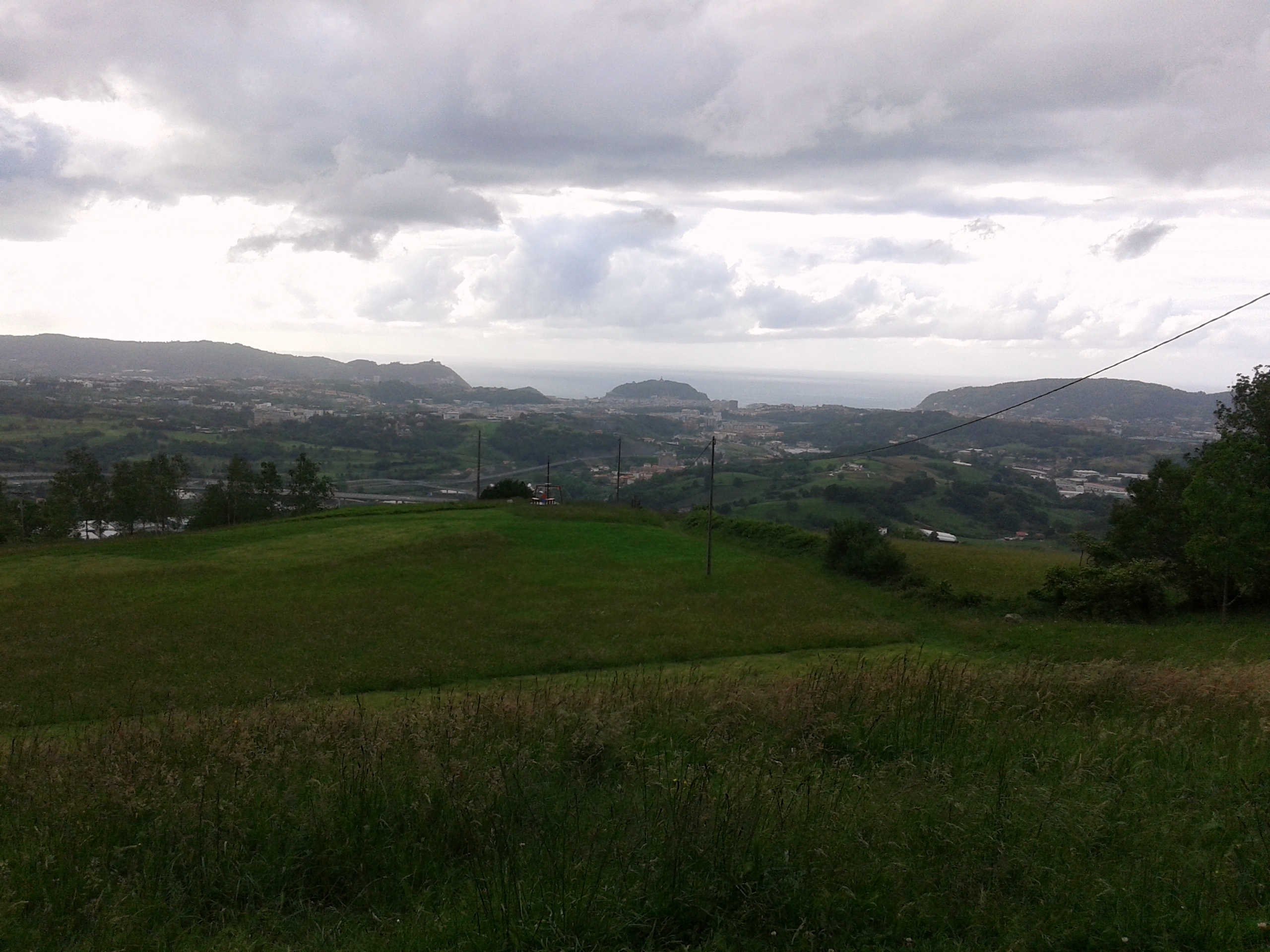 Santiagomendiren gailurretik euskal kostaldea eta Donostia.